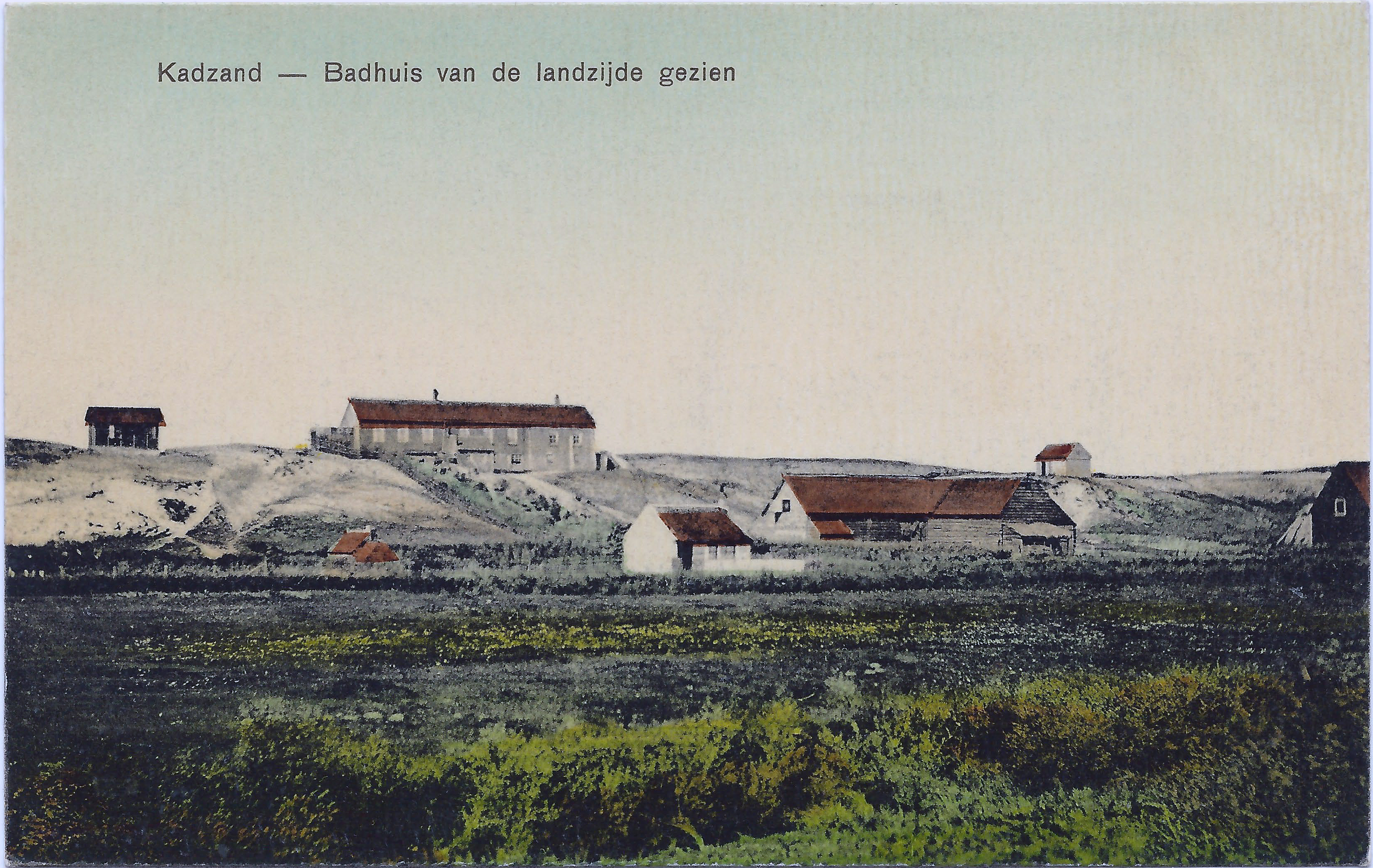 Cadzand badhuis die tot de Tweede Wereldoorlog heeft bestaan. [1]